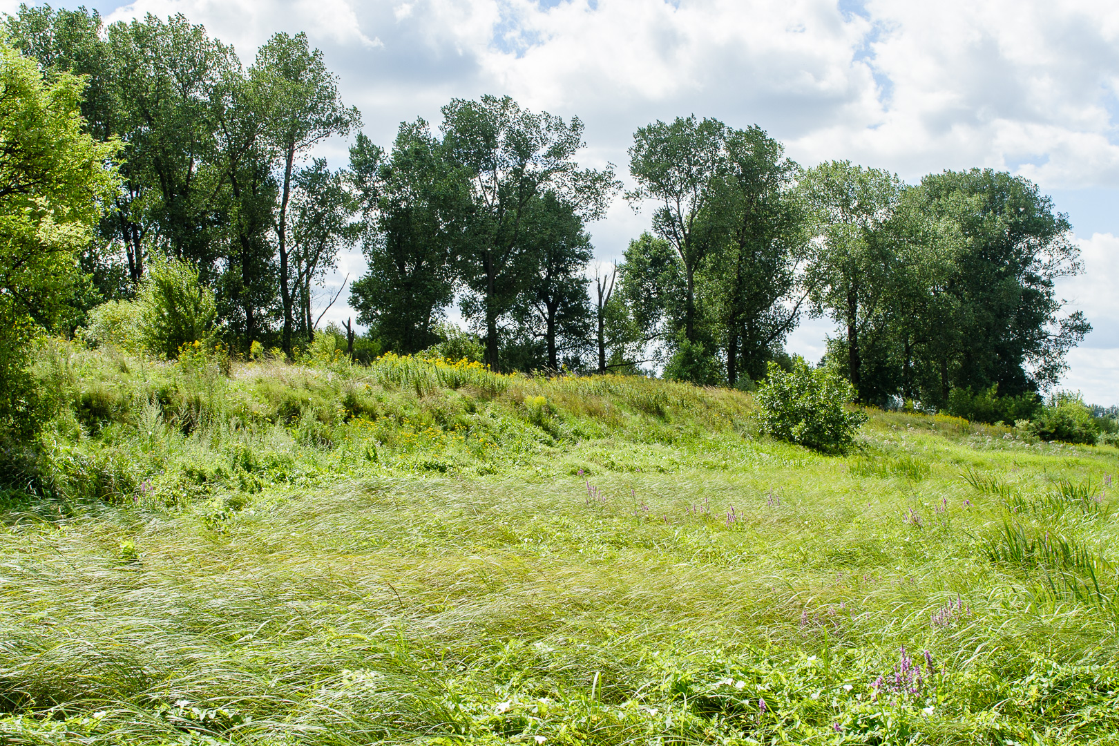 Zakole Wawerskie - skarpa tarasu nadzalewowego w pobliżu Jeziora Żabiego. Zakole położone jest niżej, na tarasie zalewowym Wisły. Widoczne są tople czarne rosnące wzdłuż Kanału Nowe Ujście. Zerzeń, Wawer, Warszawa.